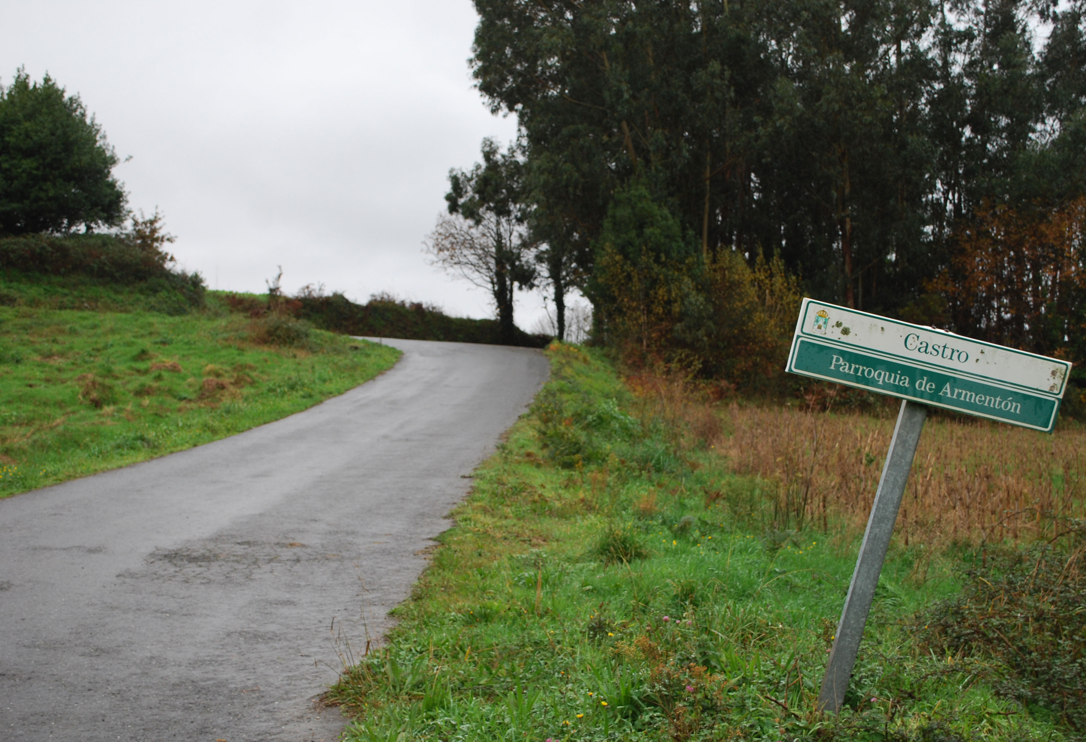 Acceso a Castro, Armentón Arteixo A Coruña Galiza Spain